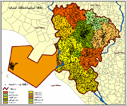 خارطة الكثافة السكانية بمحافظة المنوفية - مصر